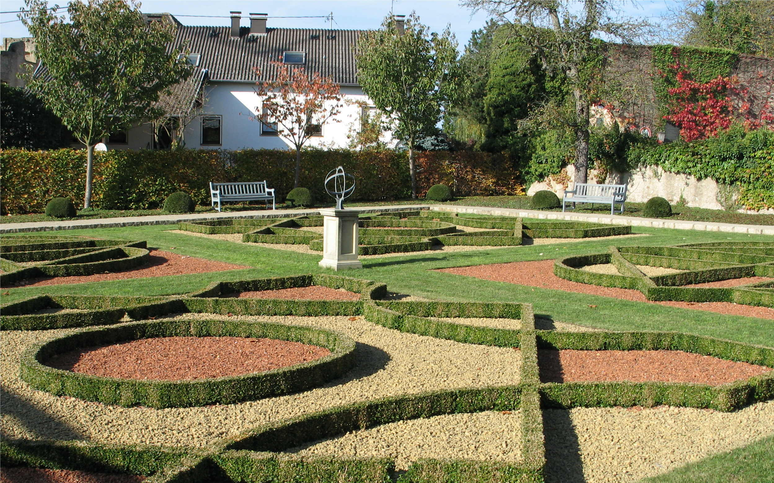 Renaissancegaart zu Nennig